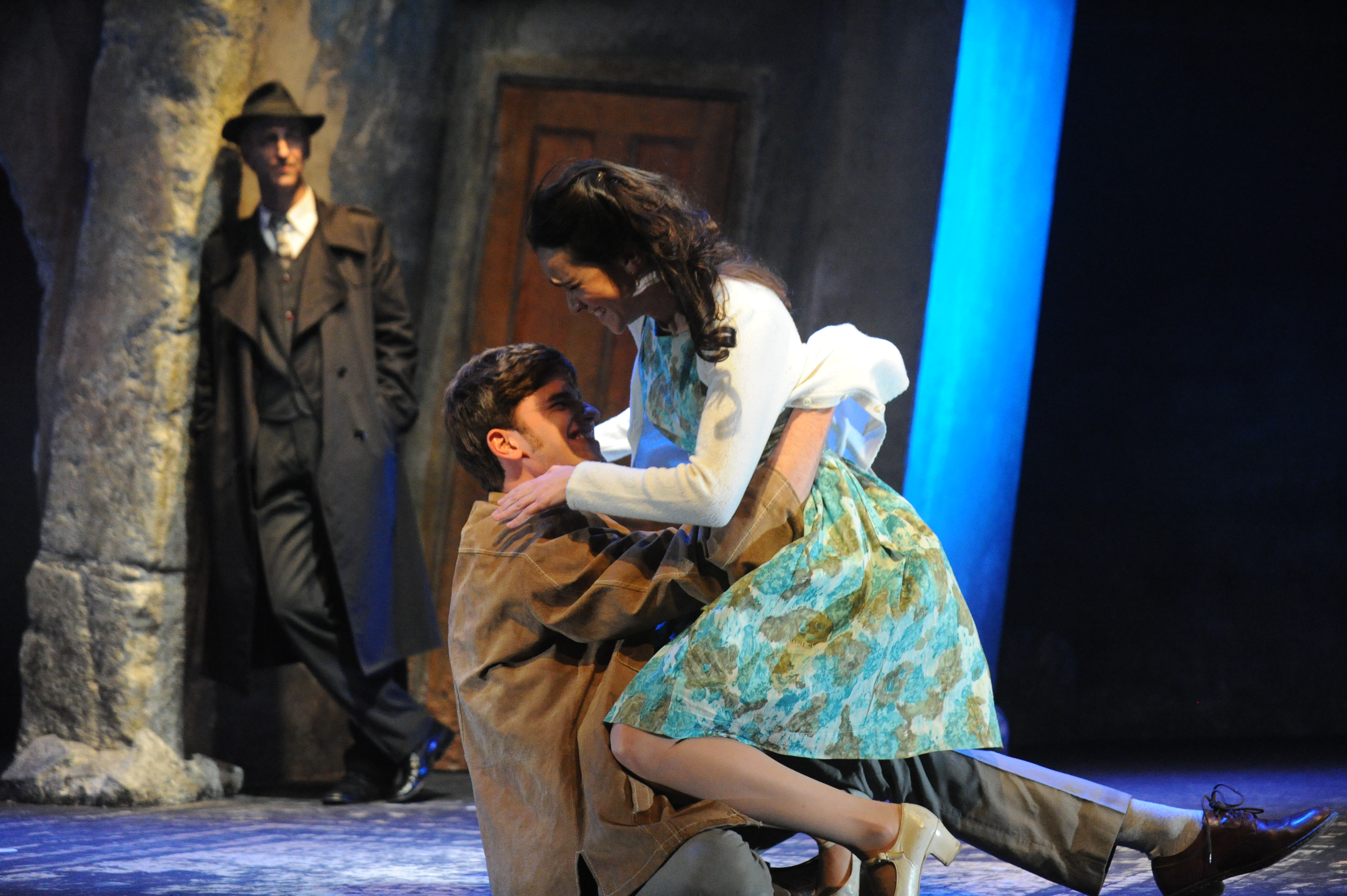 תמר אלקן ואריאל וולף בהצגה"חוקר פרטי", מאת ובבימויו של מיקי גורביץ', תיאטרון החאן, 2011